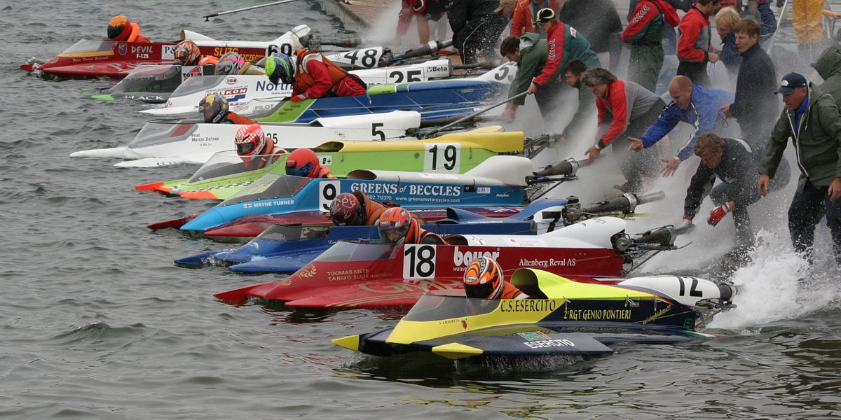 Start der Formel 125 in Bitterfeld (GER)